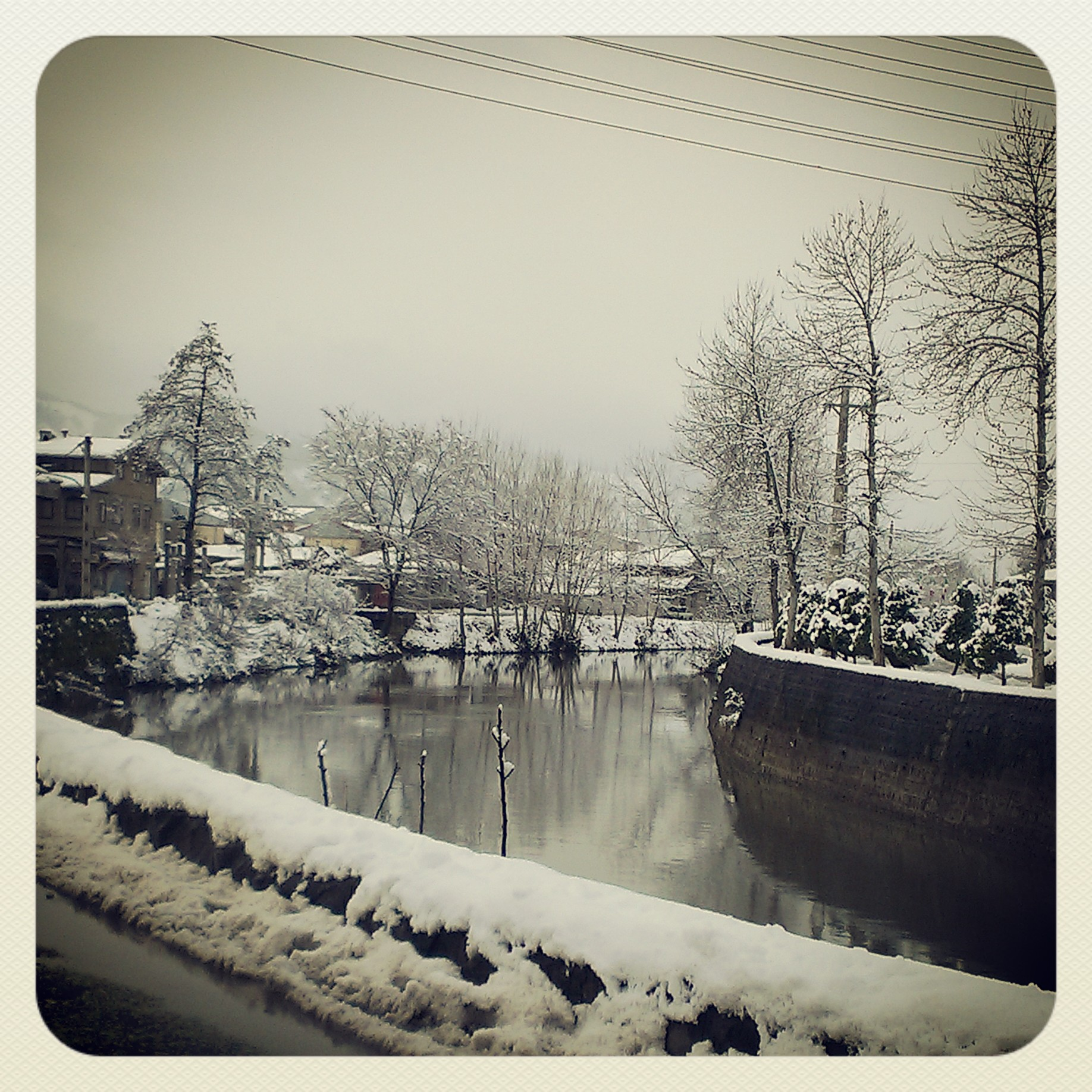 langroud snow 92